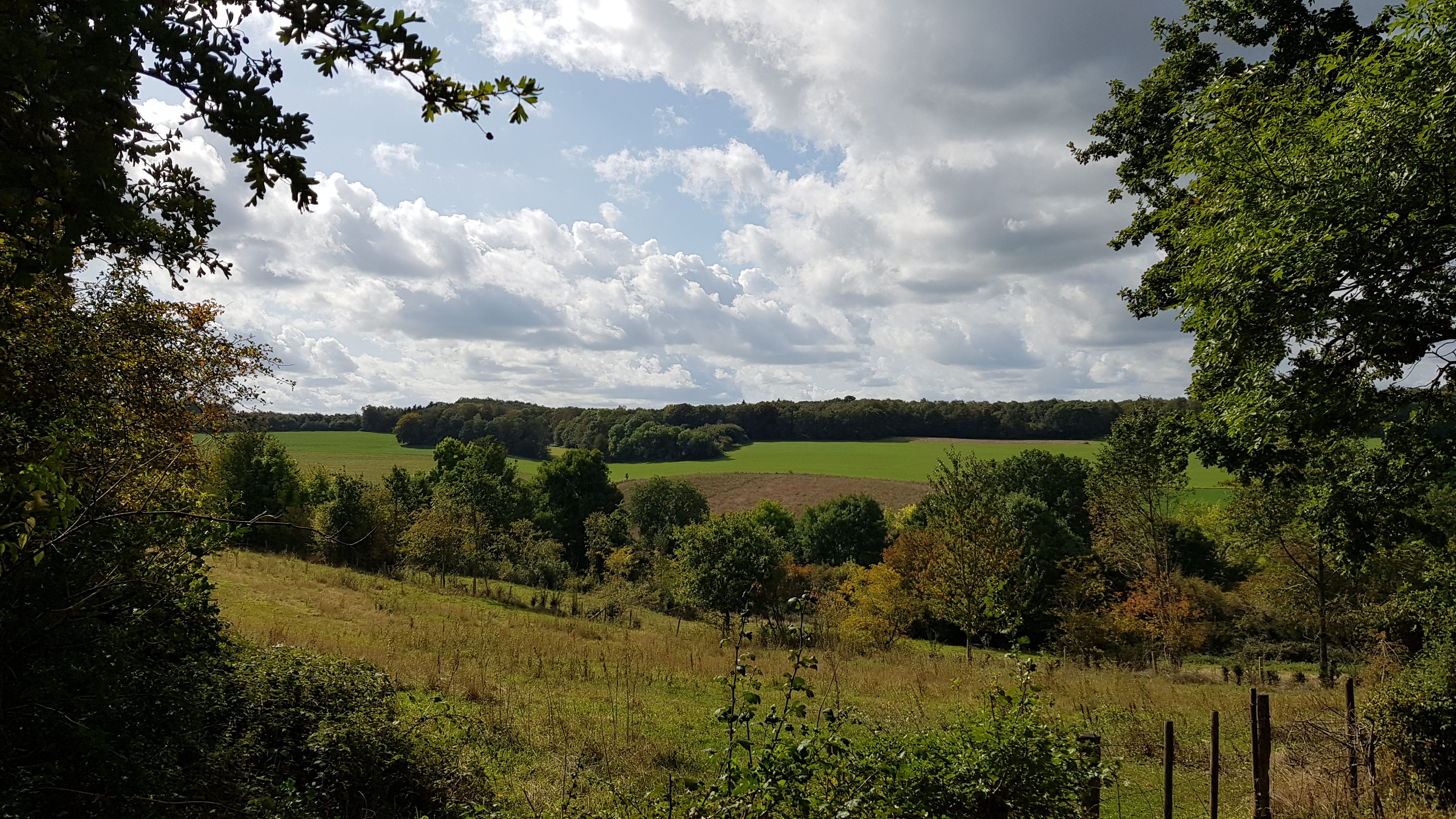 uitzicht nabij de Groeve Crapoel, Crapoel, Gulpen-Wittem, Nederland